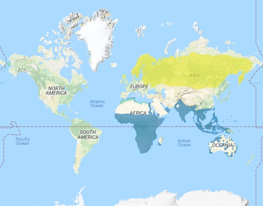 Srpski (latinica): Mapa rasprostranjenja sprudnika migavca (Tringa glareola) prema sajtu BirdLife International. Žuta boja predstavlja gnezdeći areal, a plava boja areal rasprostranjenja tokom zime